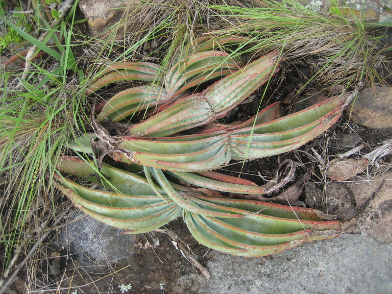 Aloe suprafoliata on Mount Ponduine, Namaacha, Mozambique.